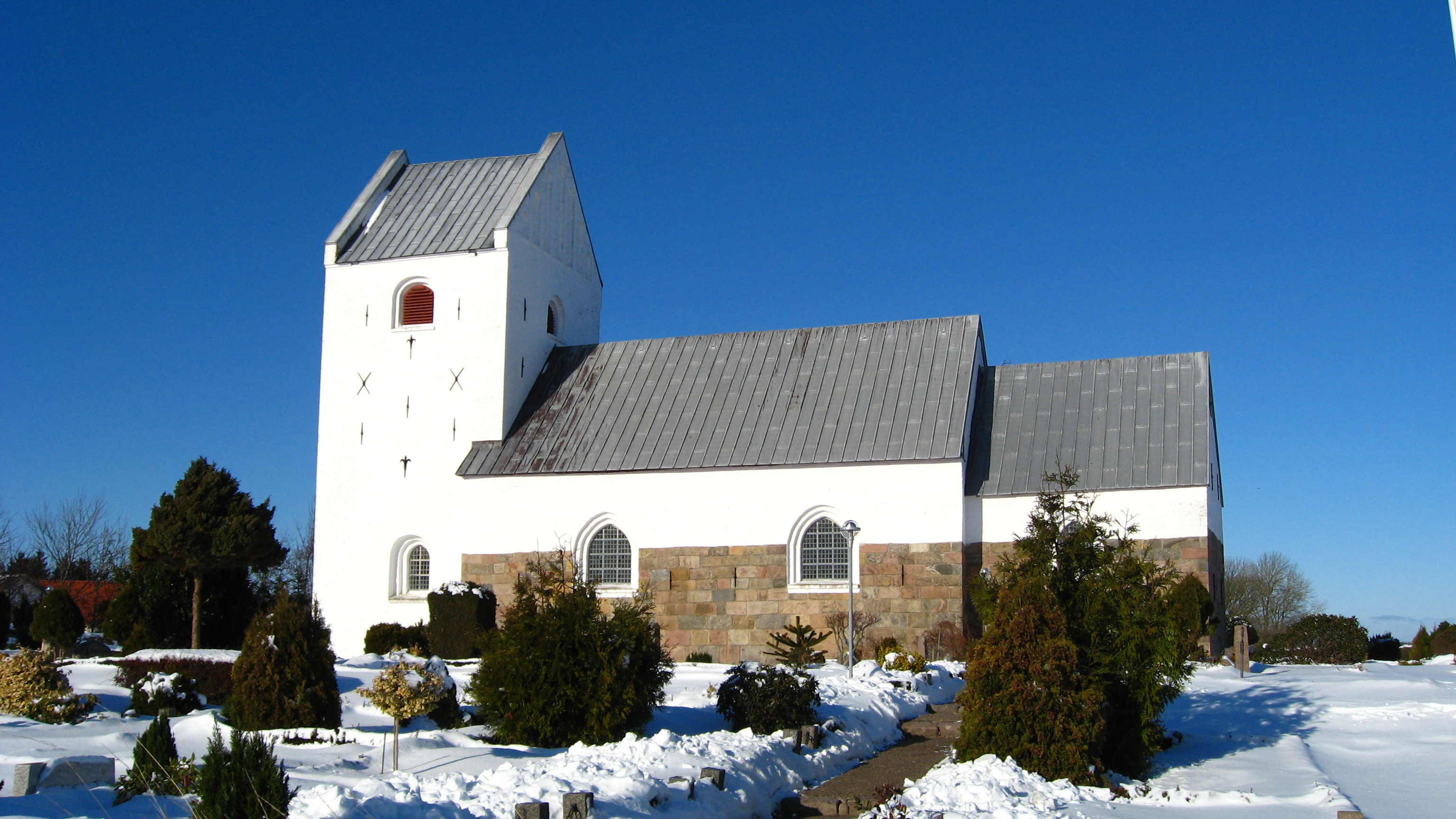 Vester Hjermitslev Kirke